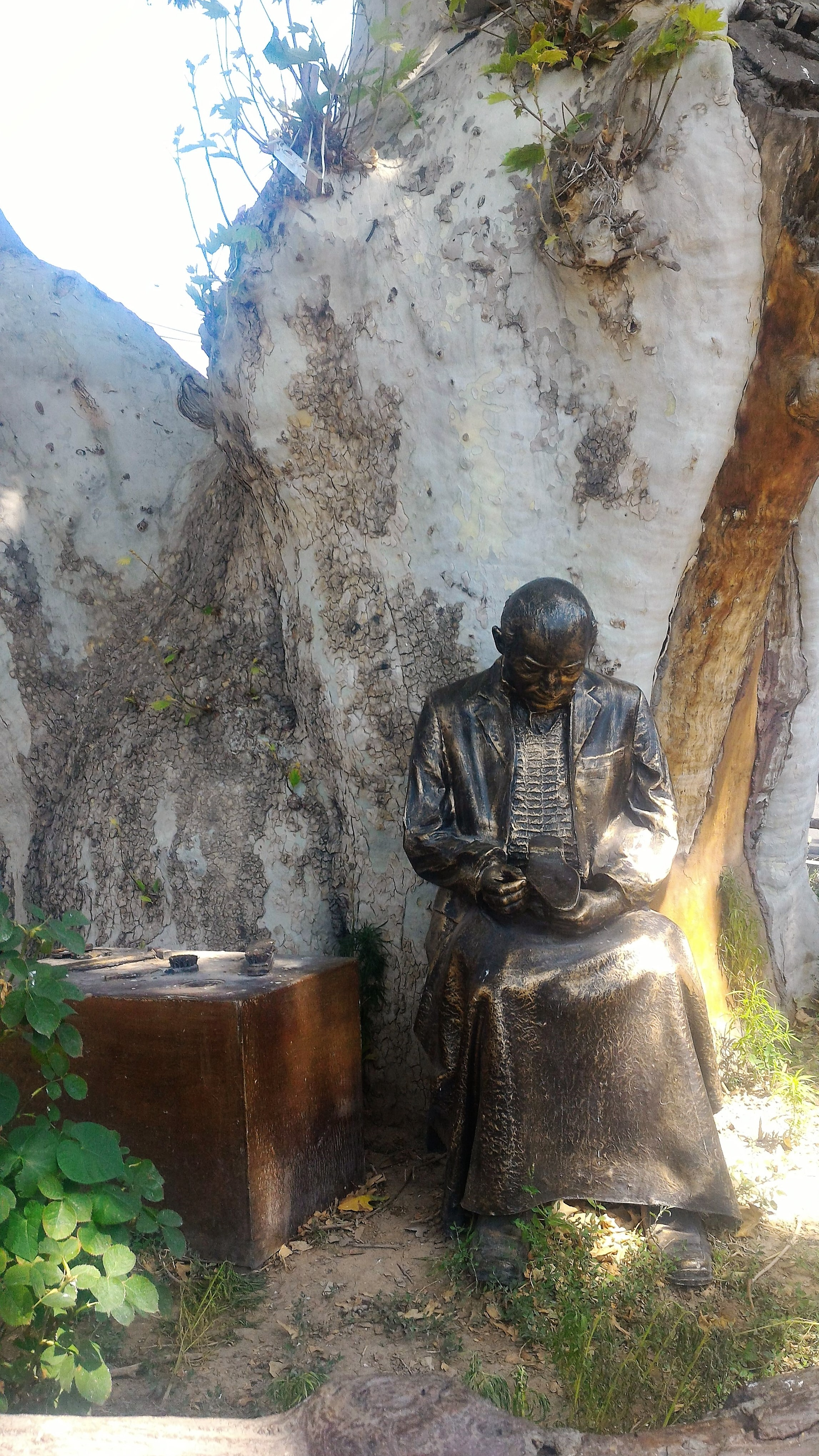 تندیس مرد پینه دوز در کنار درخت چنار 1200 ساله در اسکو